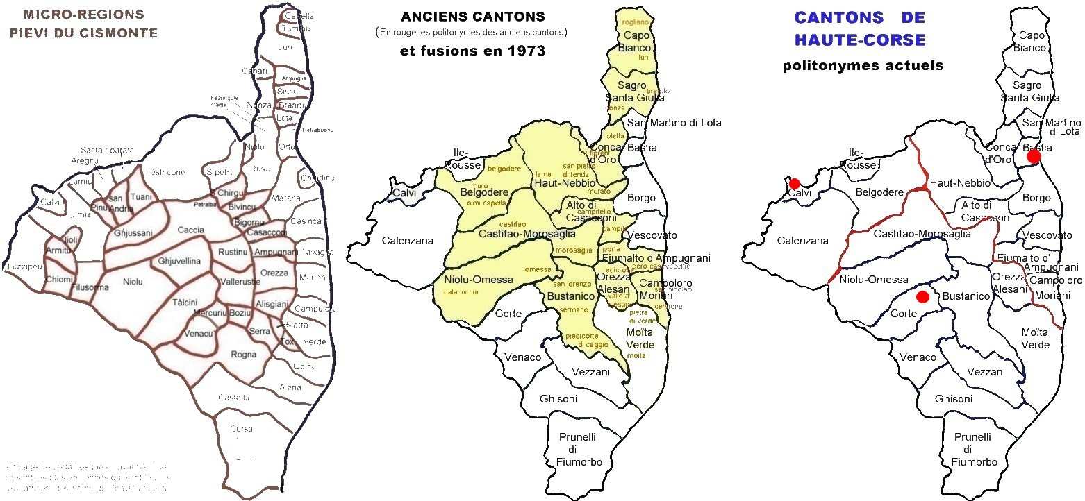 Cantons de Haute Corse origines. Cantons électoraux actuels, avec les anciens cantons et les micro-régions (pievi) auxquels ils correspondent. Corsu: Ghjure eleturali, cu i cantoni di nanzu, è cu e pievi